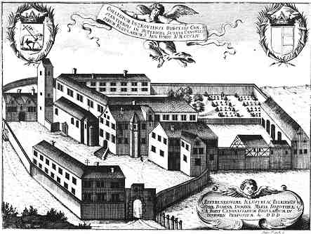 Augustiner-Chorfrauenstifts Inzigkofen um 1700